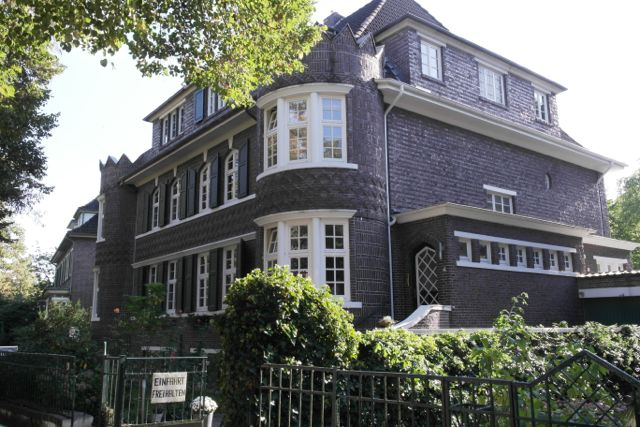 Wohnhaus in Bremen, Schwachhauser Ring 4Das abgebildete Objekt ist ein geschütztes Kulturdenkmal in der Freien Hansestadt Bremen, mit der Nr. 1135 beim Landesamt für Denkmalpflege registriert.